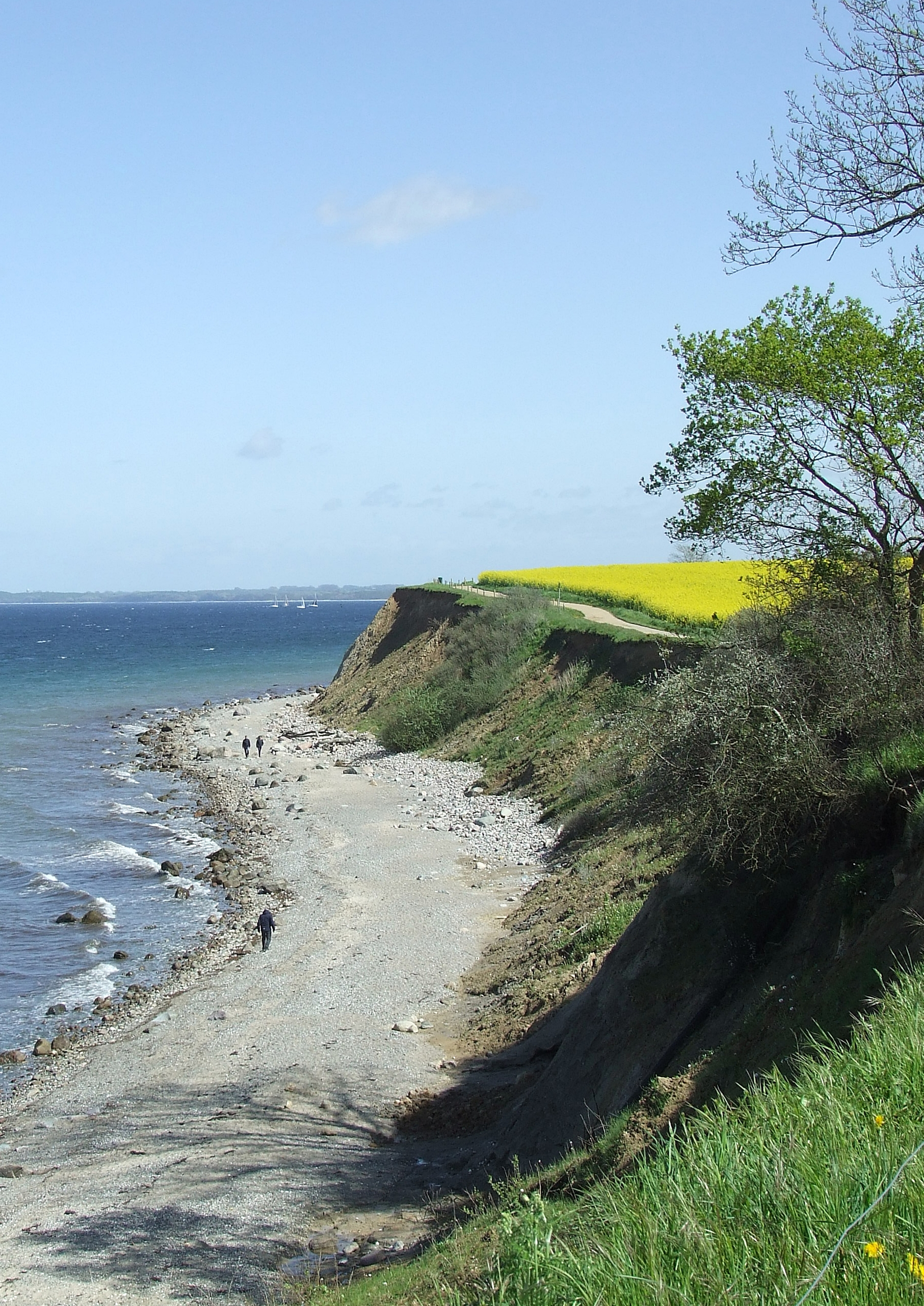 Zu sehen ist das Brodtener Steilufer im Landschaftsschutzgebiet Brodtener Winkel. Der Blickwinkel folgt dem Strandweg aus Richtung Niendorf/Timmendorfer Strand kommend in Richtung Brodten/Travemünde. Am Horizont sind Segelboote, am rechten Bildrand ein Rapsfeld zu sehen.